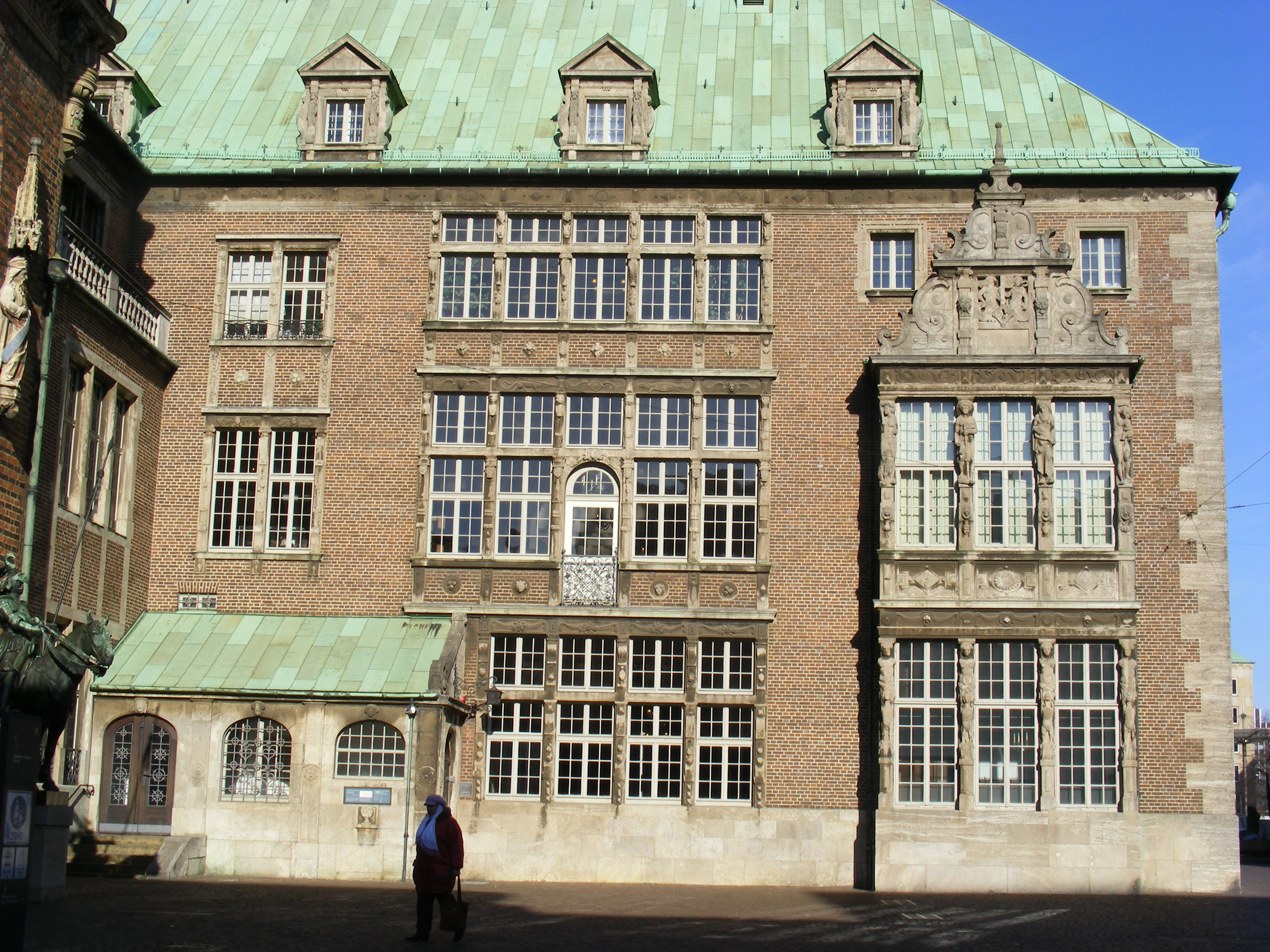 Südwestfassade des Neuen Rathauses in Bremen (Erweiterungsbau Rathauses, 1909–1913) mit Verkündigungslaube (Bogen im großen Fenster der ersten Etage) und Bürgermeistererker